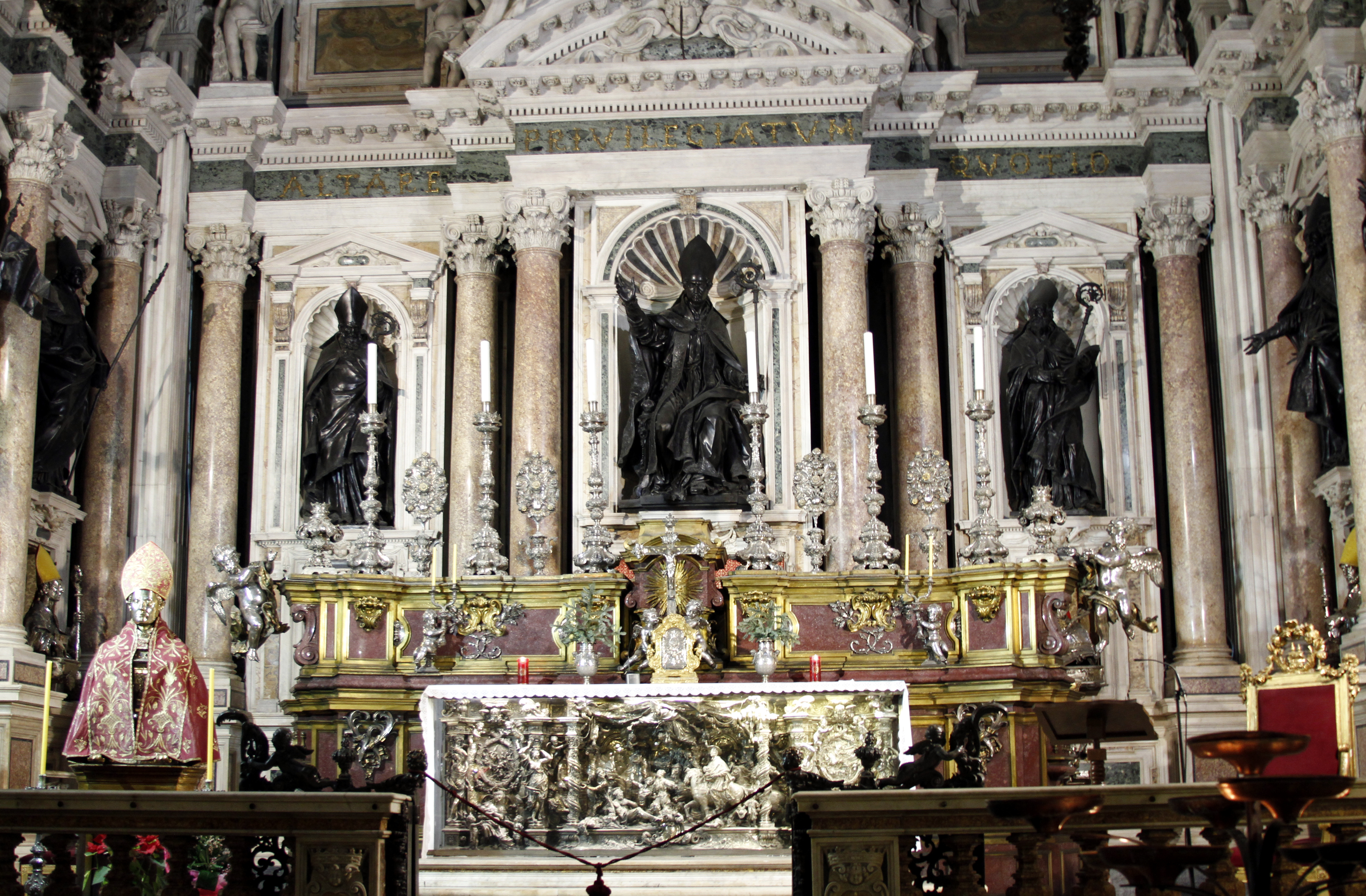 Cappella di San Gennaro, Catedral de Nápoles